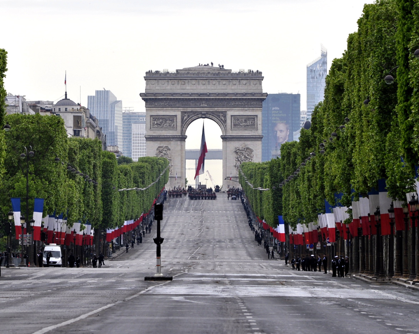 Cérémonie du jour de la Victoire en Europe le 8 mai 2015 à Paris. Photo des Champs Elysées depuis la place de la Concorde. La garde républicaine stationne près de la place Charles-de-Gaulle. L'avenue est décorée de drapeaux français et les feux tricolores sont enlevés.